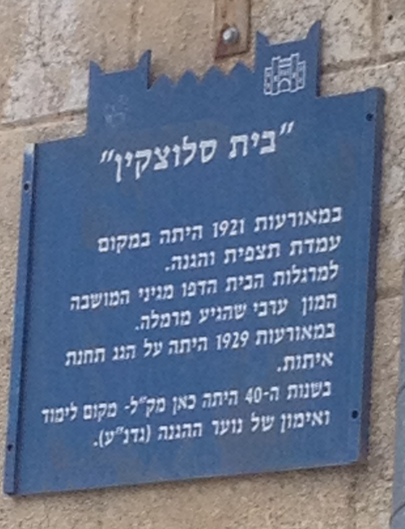 בית סלוצקין, רחוב מנוחה ונחלה 58, רחובות כיום חלק מביה"ס התיכון ע"ש עמוס דה שליט